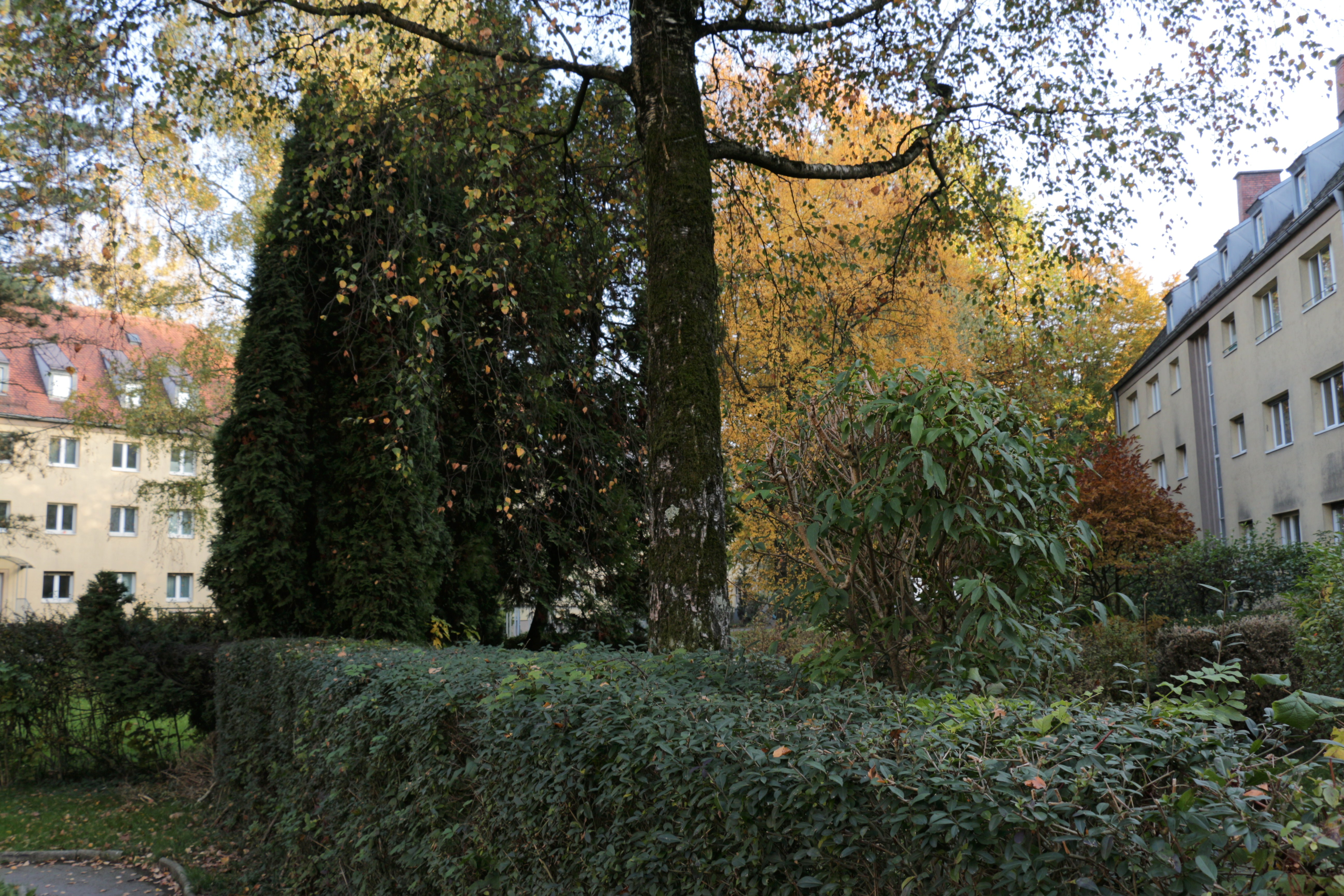 In der General-Keyes-Siedlung in Salzburg-Liefering